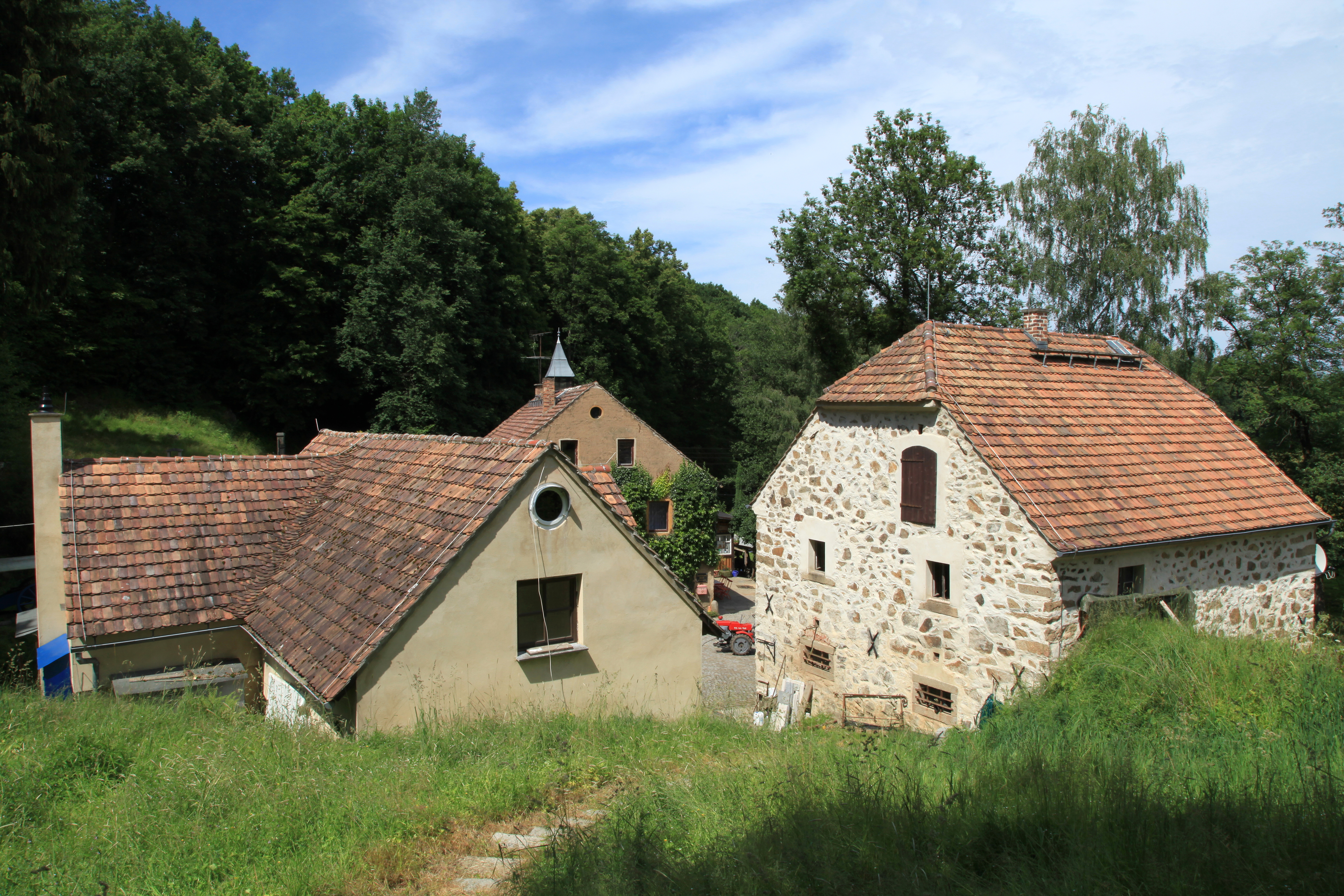 Gemauerte Mühle am Löbauer Wasser in der Georgewitzer Skala in Löbau